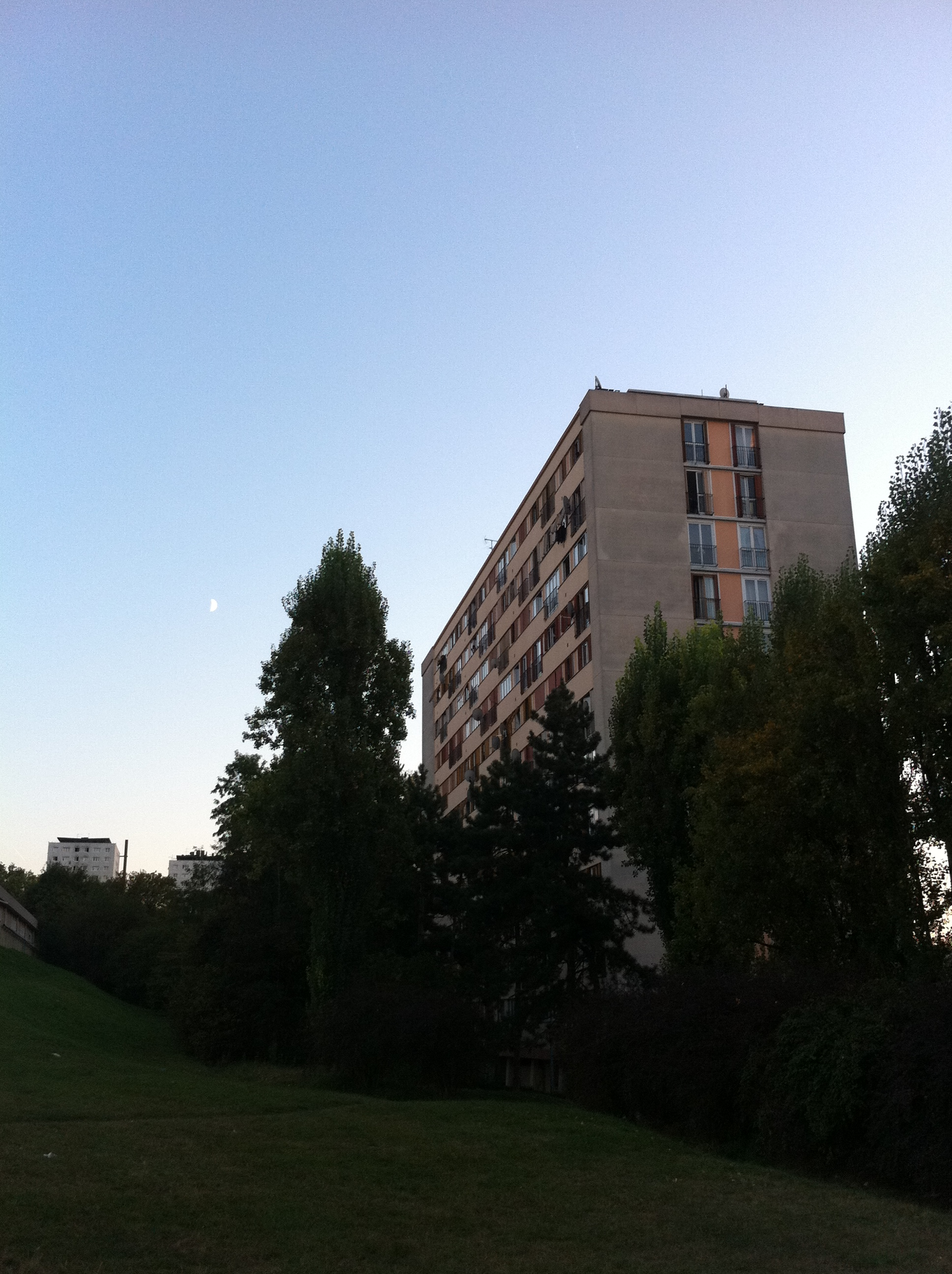 Prise le 03 octobre 2011.